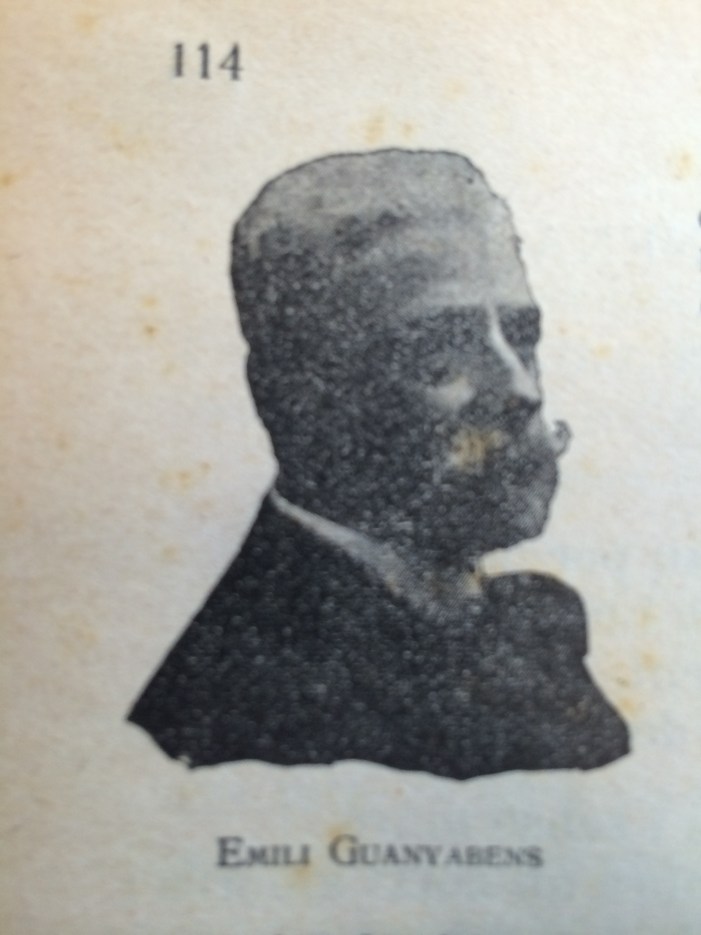 Emili Guanyavents i Jané (Barcelona, 1860 - 1941) fou poeta i traductor.